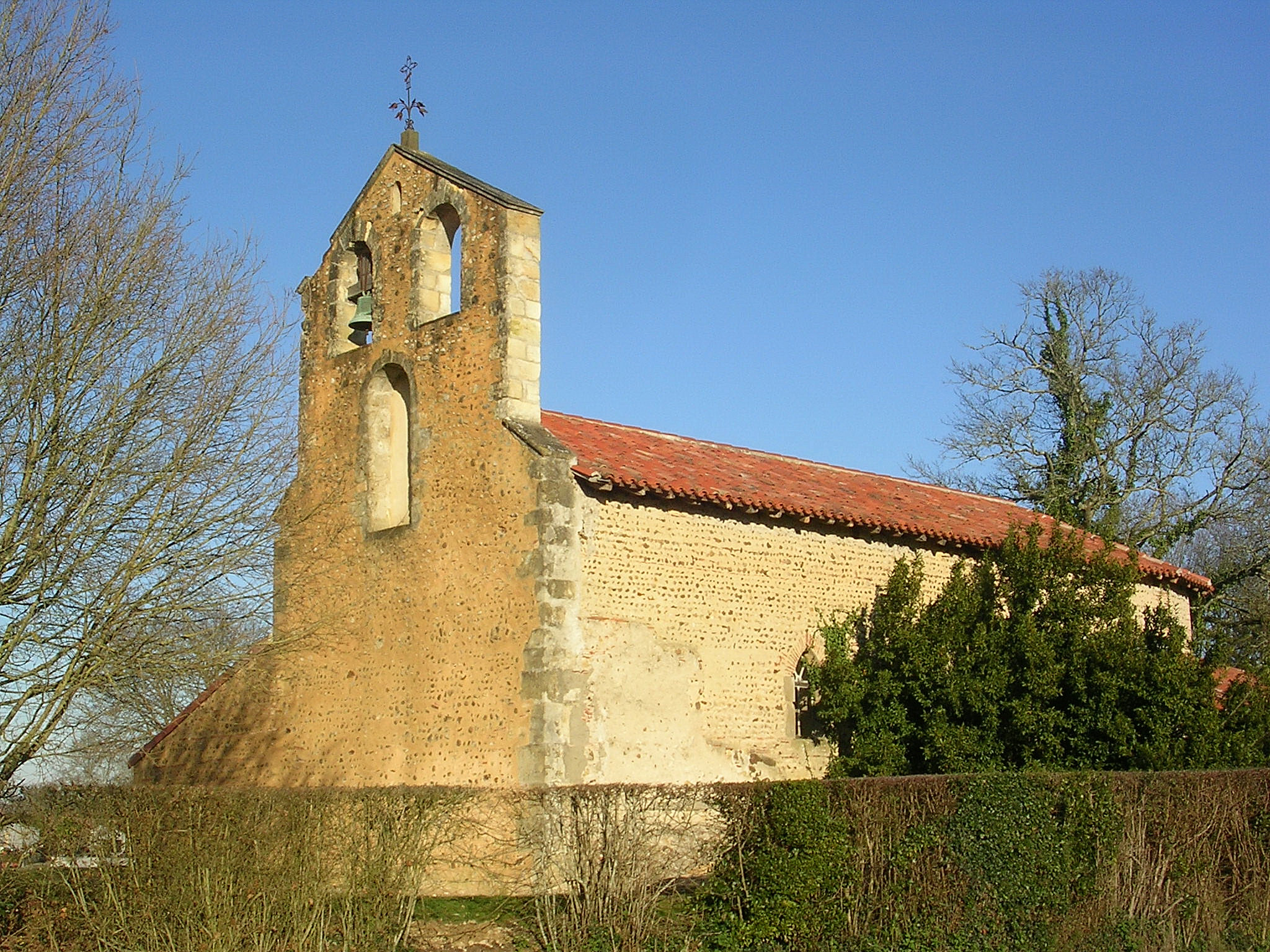 Église Sainte-Marie-Madeleine de Bachen, à Duhort-Bachen (Landes, France)